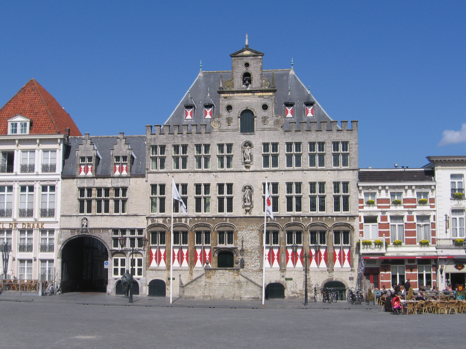 Zicht op een deel van het oude stadhuis op de Grote Markt in het centrum van Bergen op Zoom